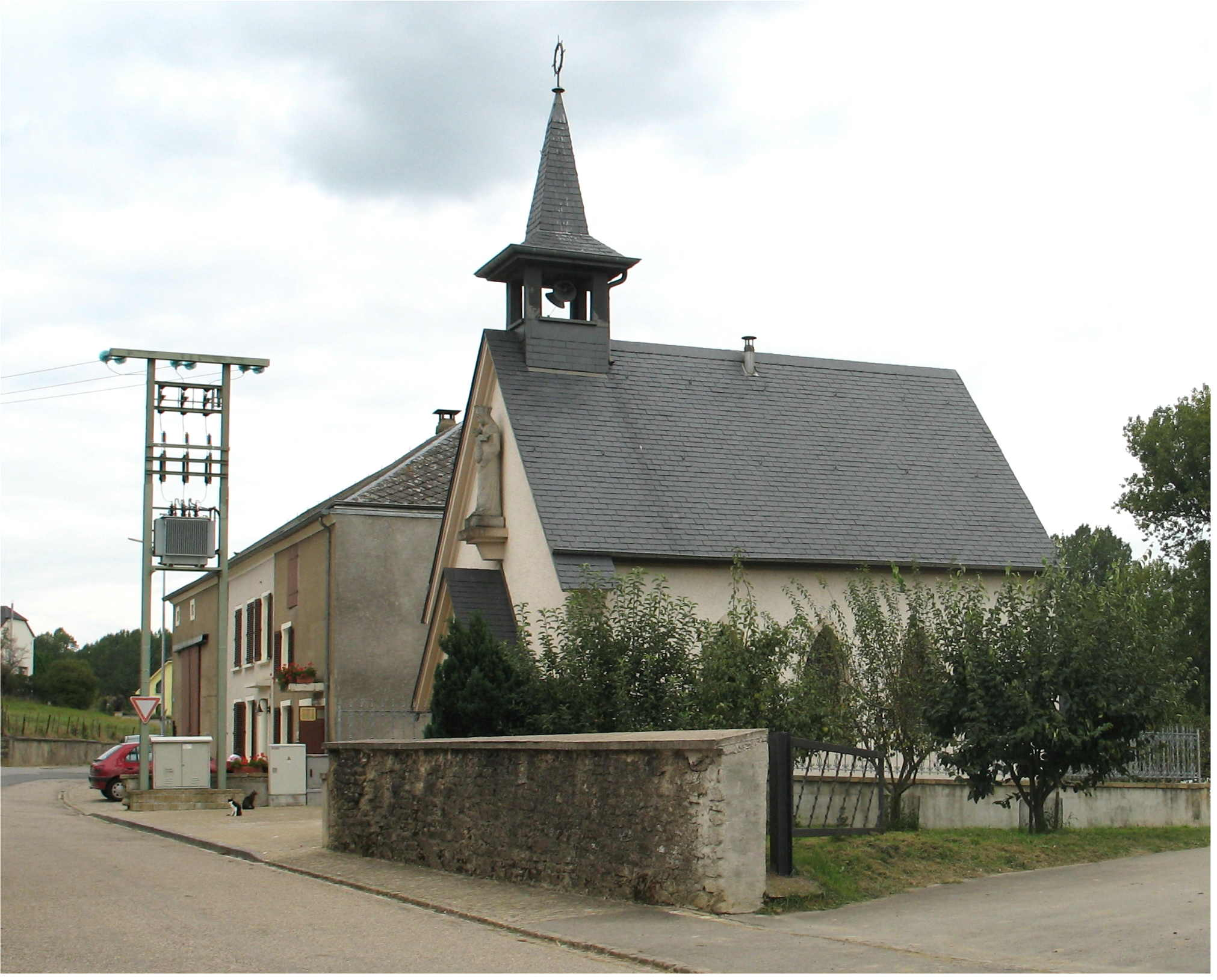 Sujet: Bei der Kierch zu Eimereng Auteur: Reniarf Source: Eege Photo vum 2. September 2007